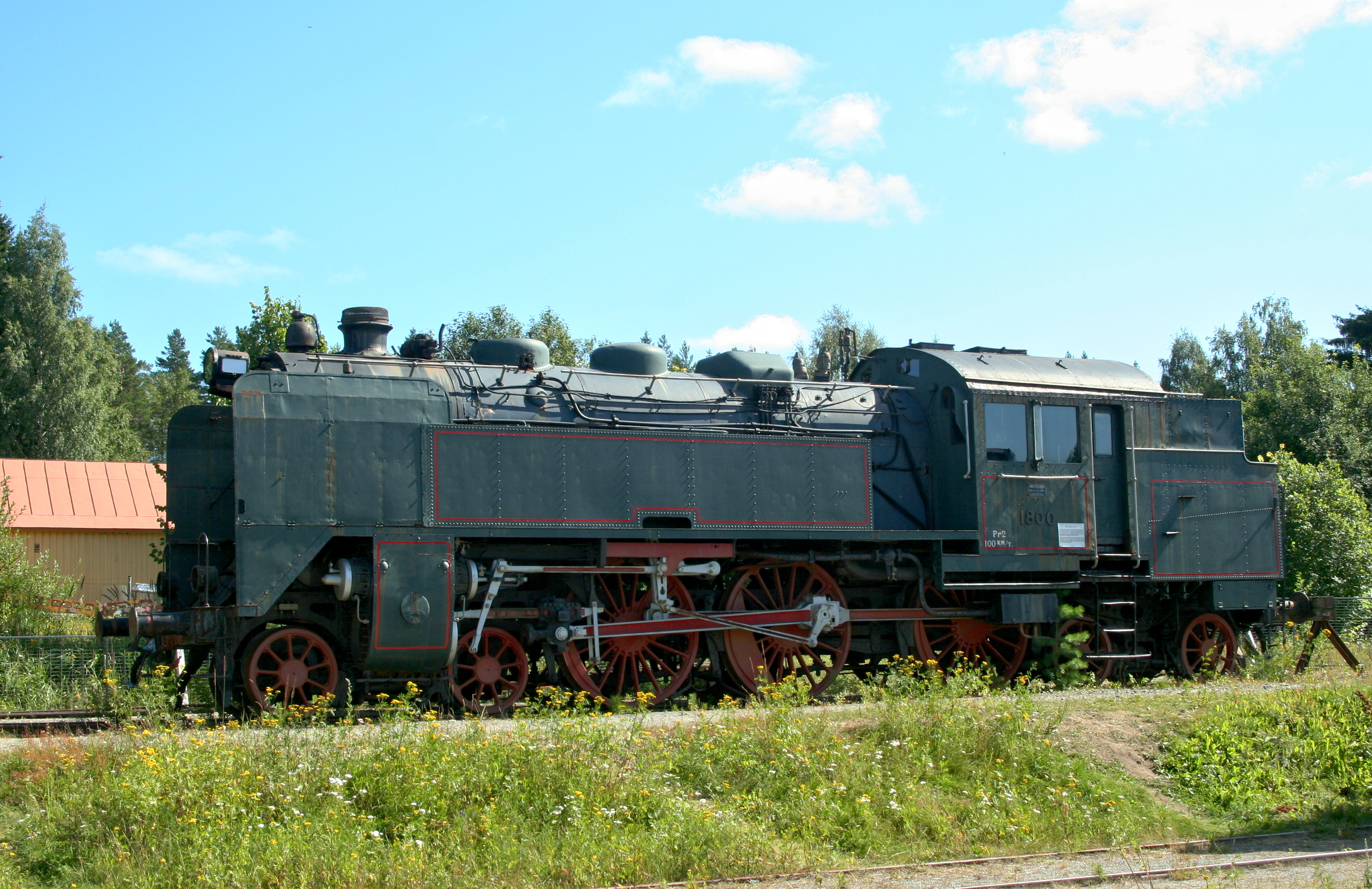 Dampflokomotive Pr2 1800 , Henschel Fabriknummer 26132 , der VR im Eisenbahnmuseum in Haapamäki 02.08.2011